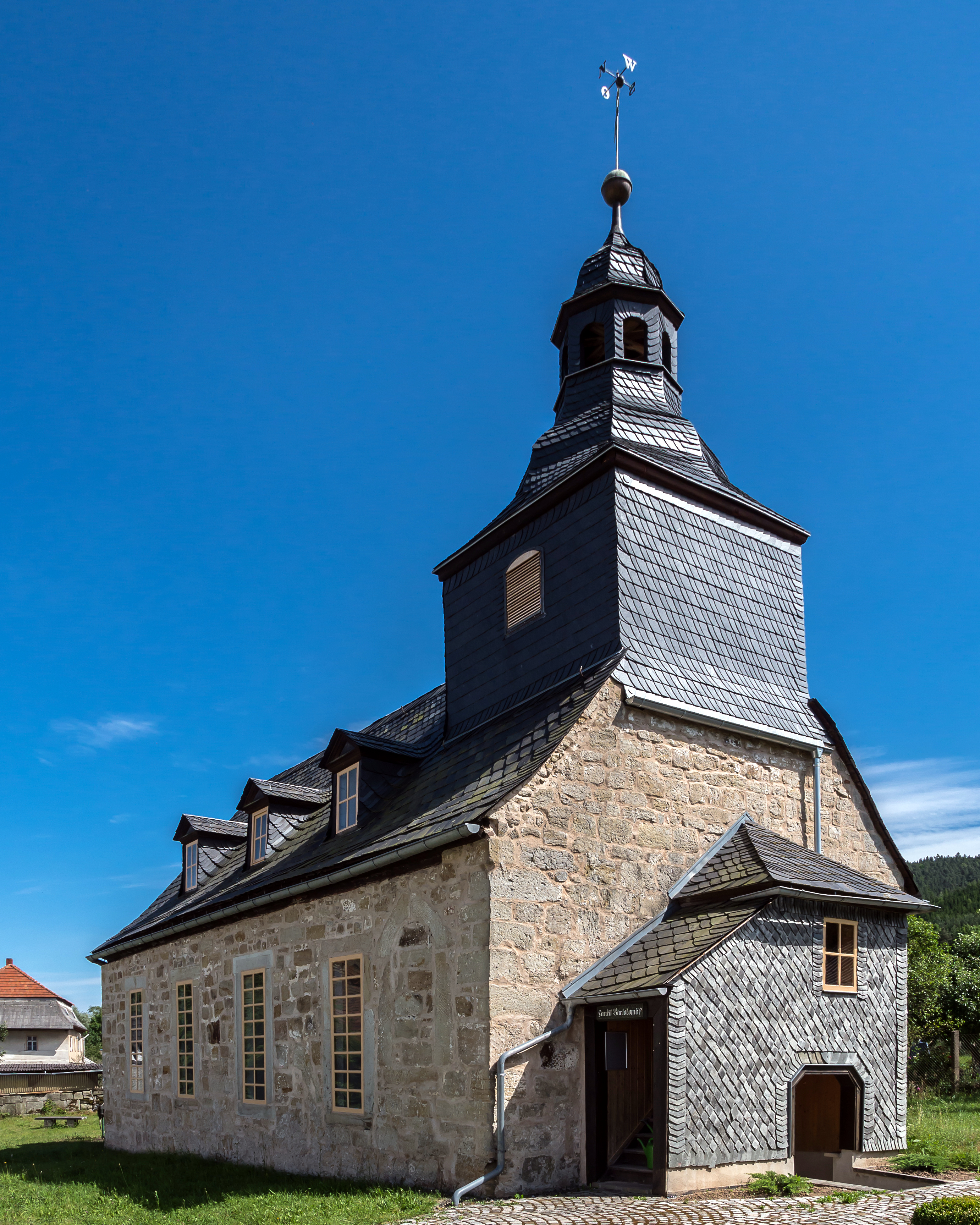 Kulturdenkmale in Bad Blankenburg Watzdorf Kirche am südlichen Ortsrand